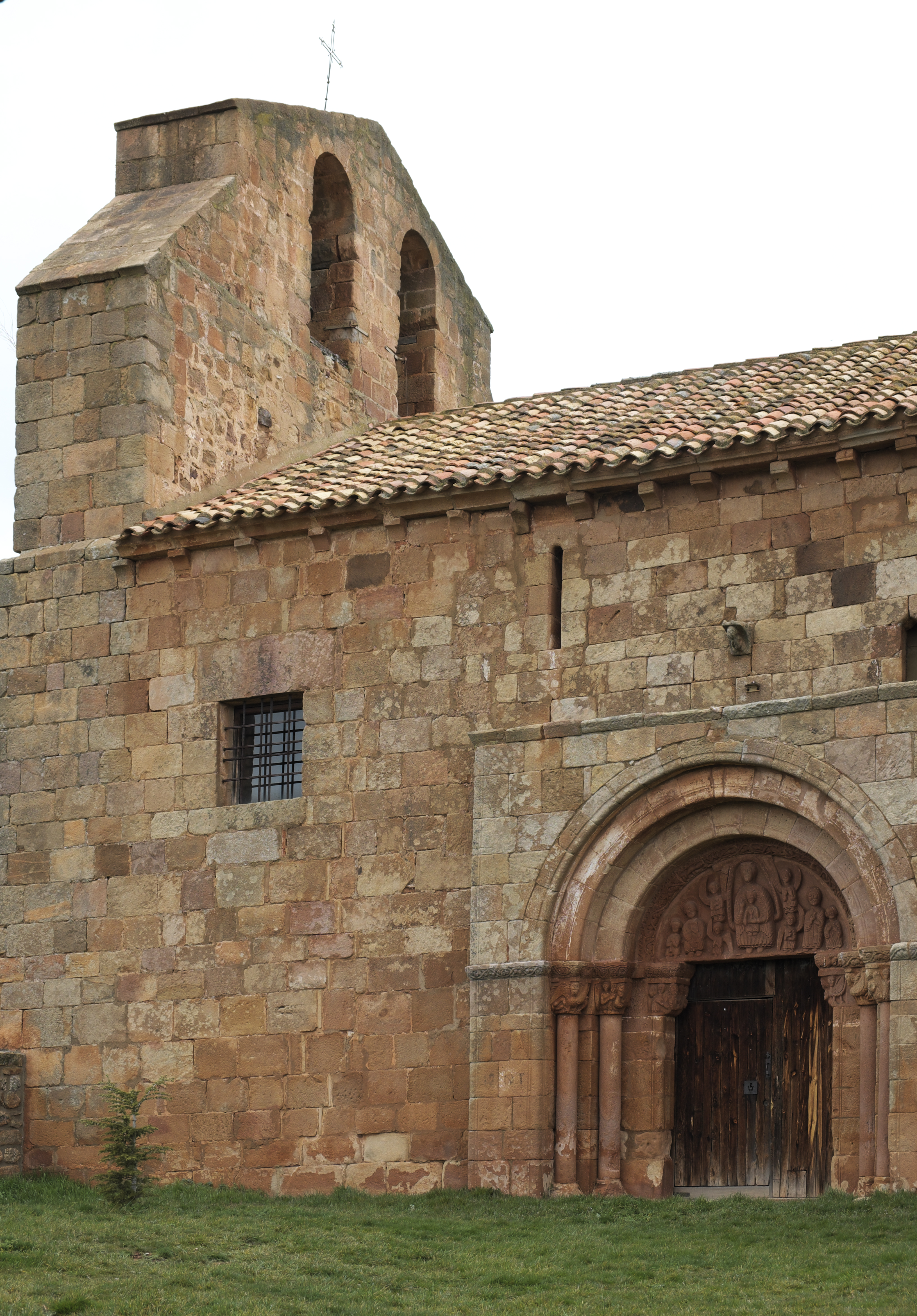 Kirche San Juan Bautista (Johannes der Täufer) in Tozalmoro in der Provinz Soria (Kastilien-León/Spanien), Ansicht von Süden